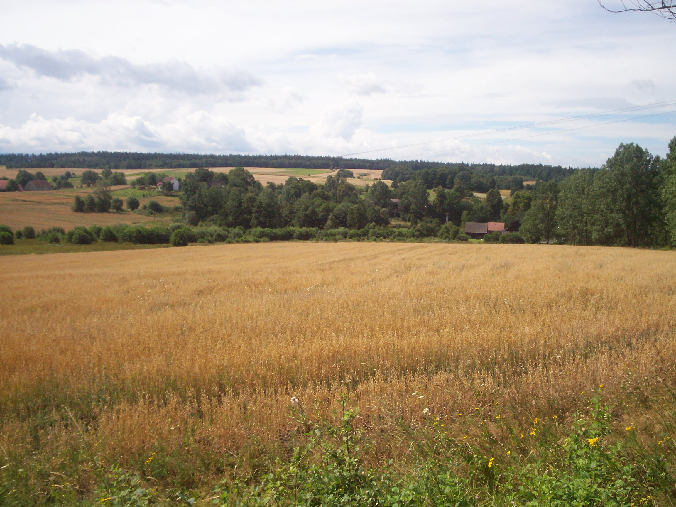 Pogórze Izerskie, widok na wieś Wojciechów.